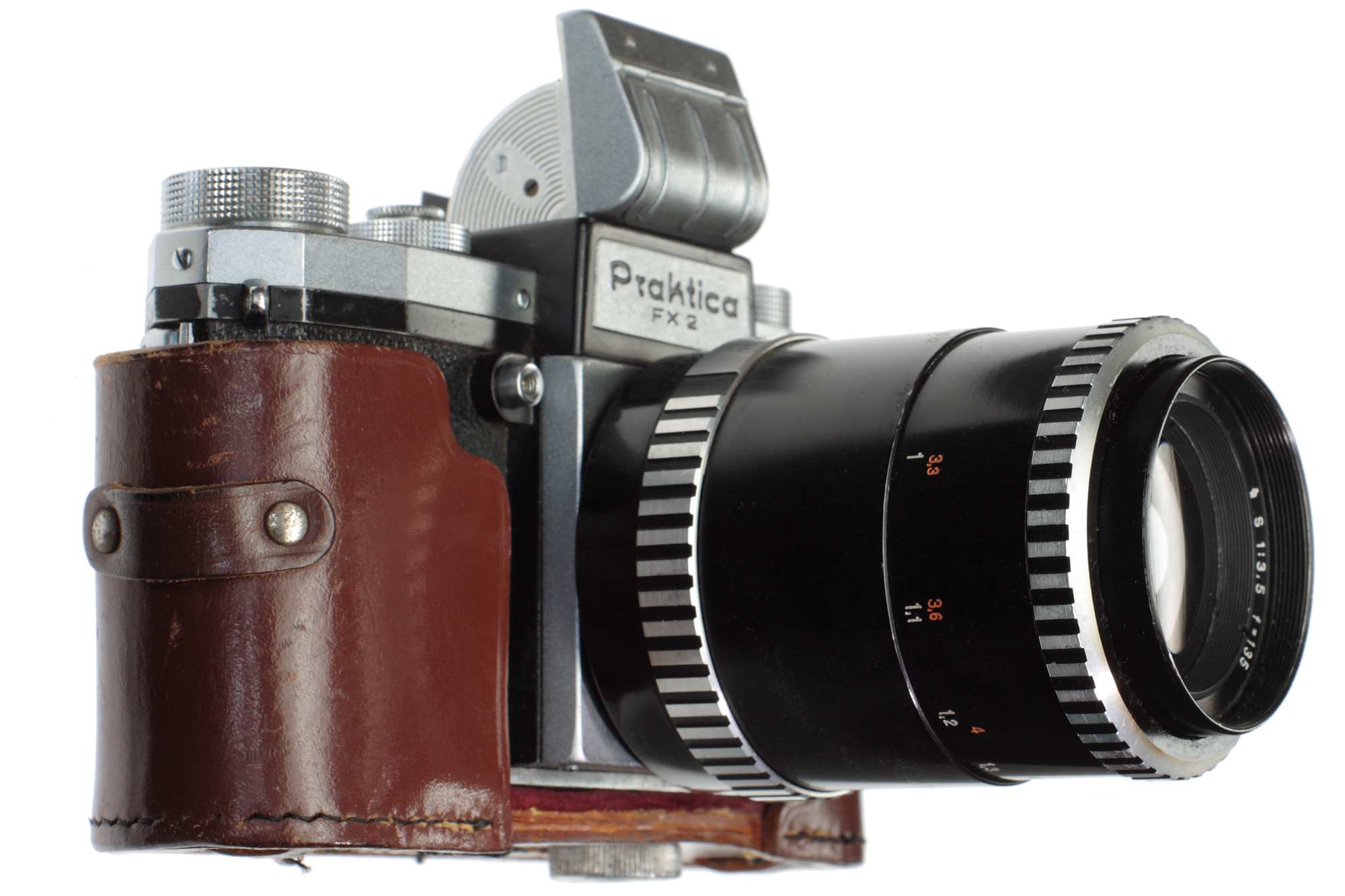 Praktica FX2 + 135mm f/3.5 Carl Zeiss Sonnar 4 Super-Takumar